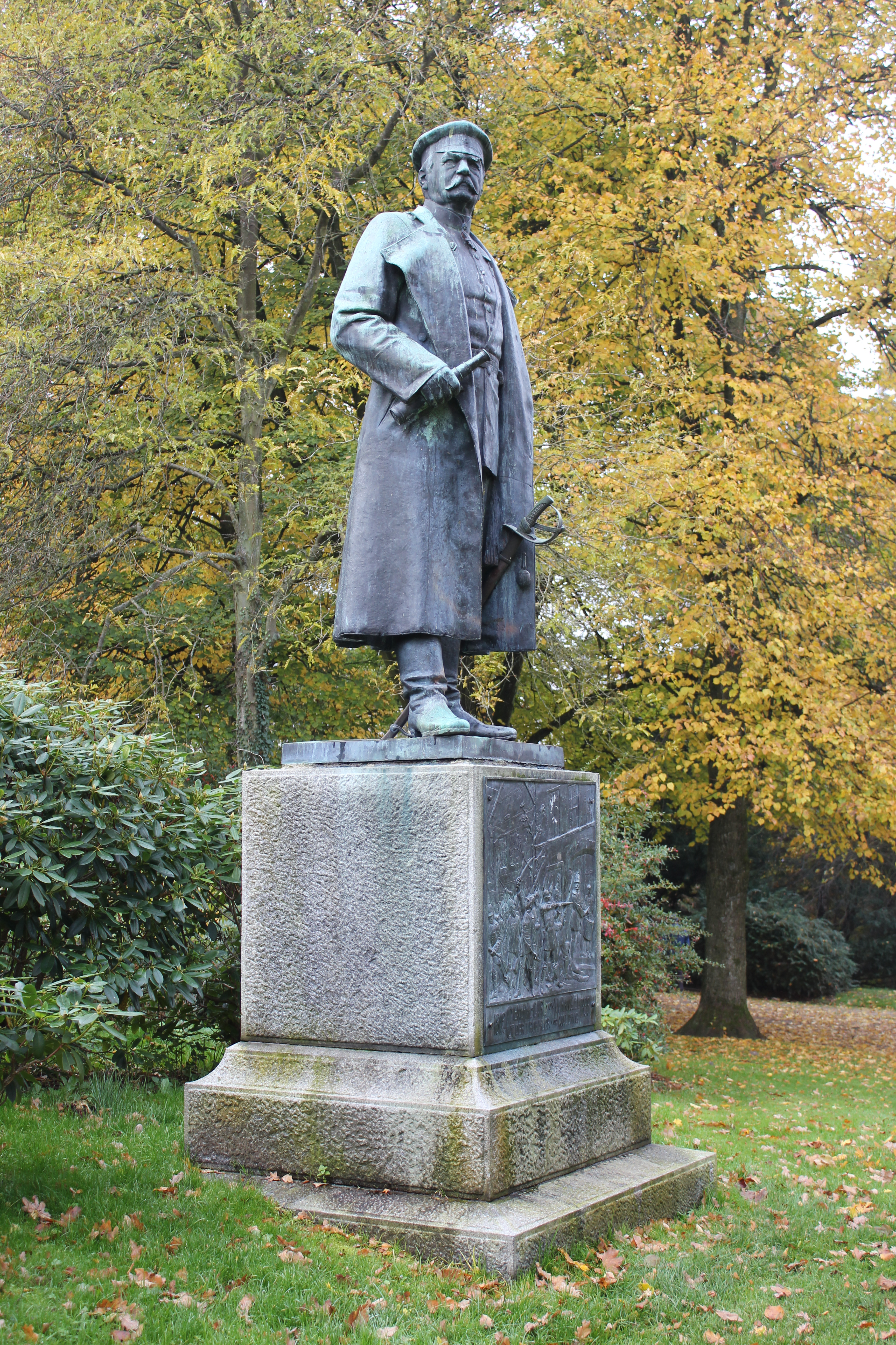 Adolf Brütt (1855-1939): Denkmal für General Karl Friedrich Wilhelm Freiherr von Wrangel (1812–1899), (Bronze, 1903), Standort: Stadtpark Flensburg; unbeschmiert und ohne Schatten im Gesicht